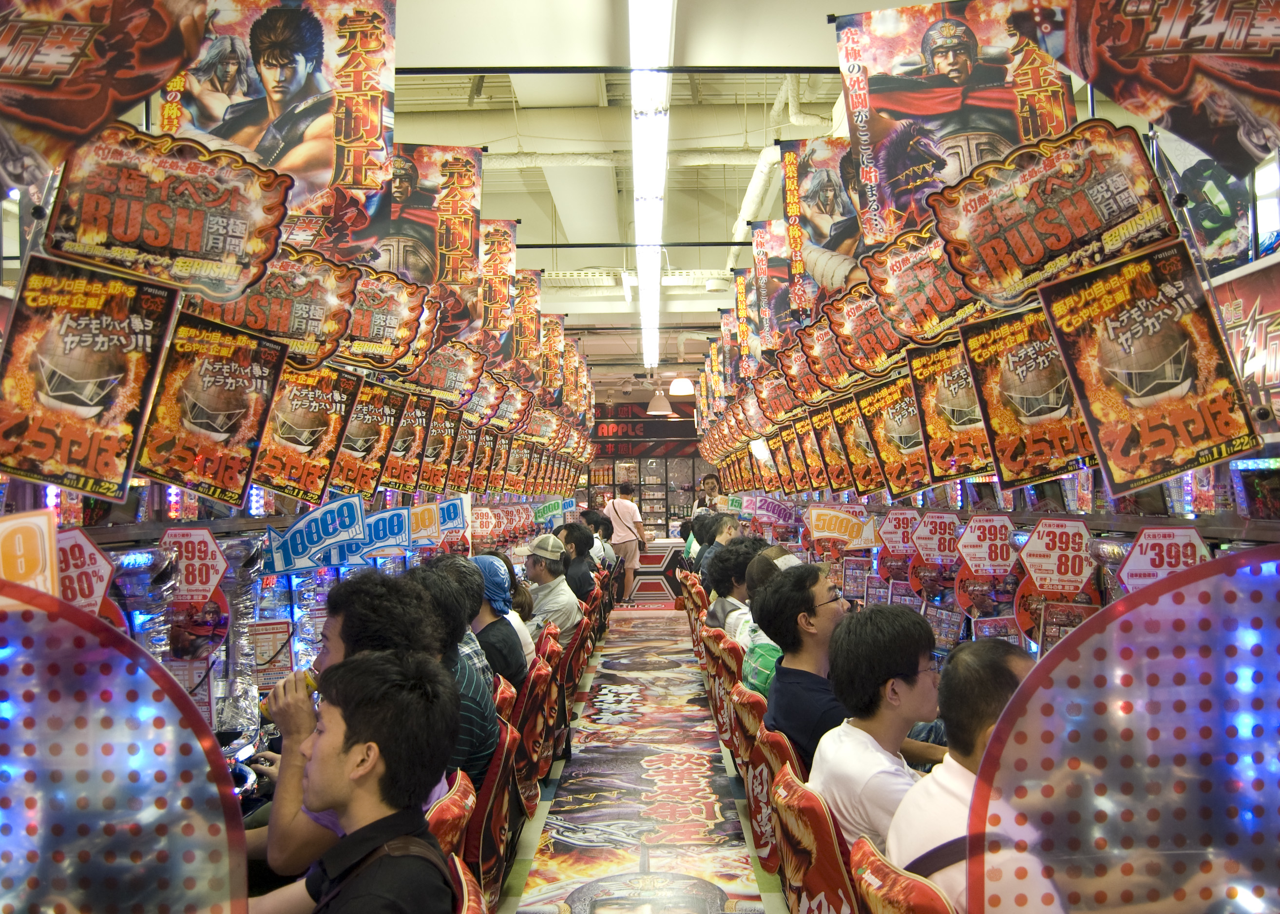 Pachinko-Halle in Akihabara, Tokio